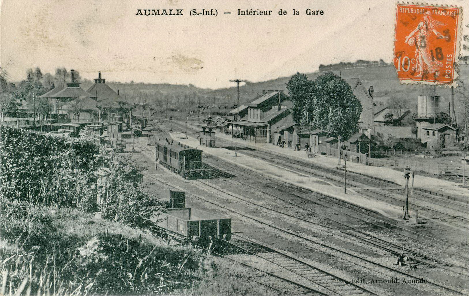 Carte postale ancienne éditée par Arnould à Aumale (Loire Inférieure) : AUMALE (Seine-Maritime) - Intérieur de la GareLes voies du chemin de fer secondaire Amiens - Aumale sont au premier plan, ceux de la ligne Paris - Le Tréport sont près du bâtiment de la gare.